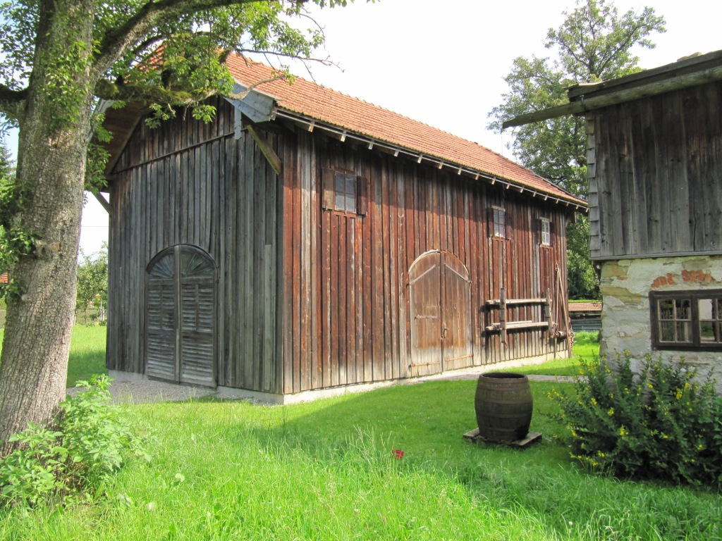 Scheune auf dem Freilichtmuseumsgelände Aignerhaus.